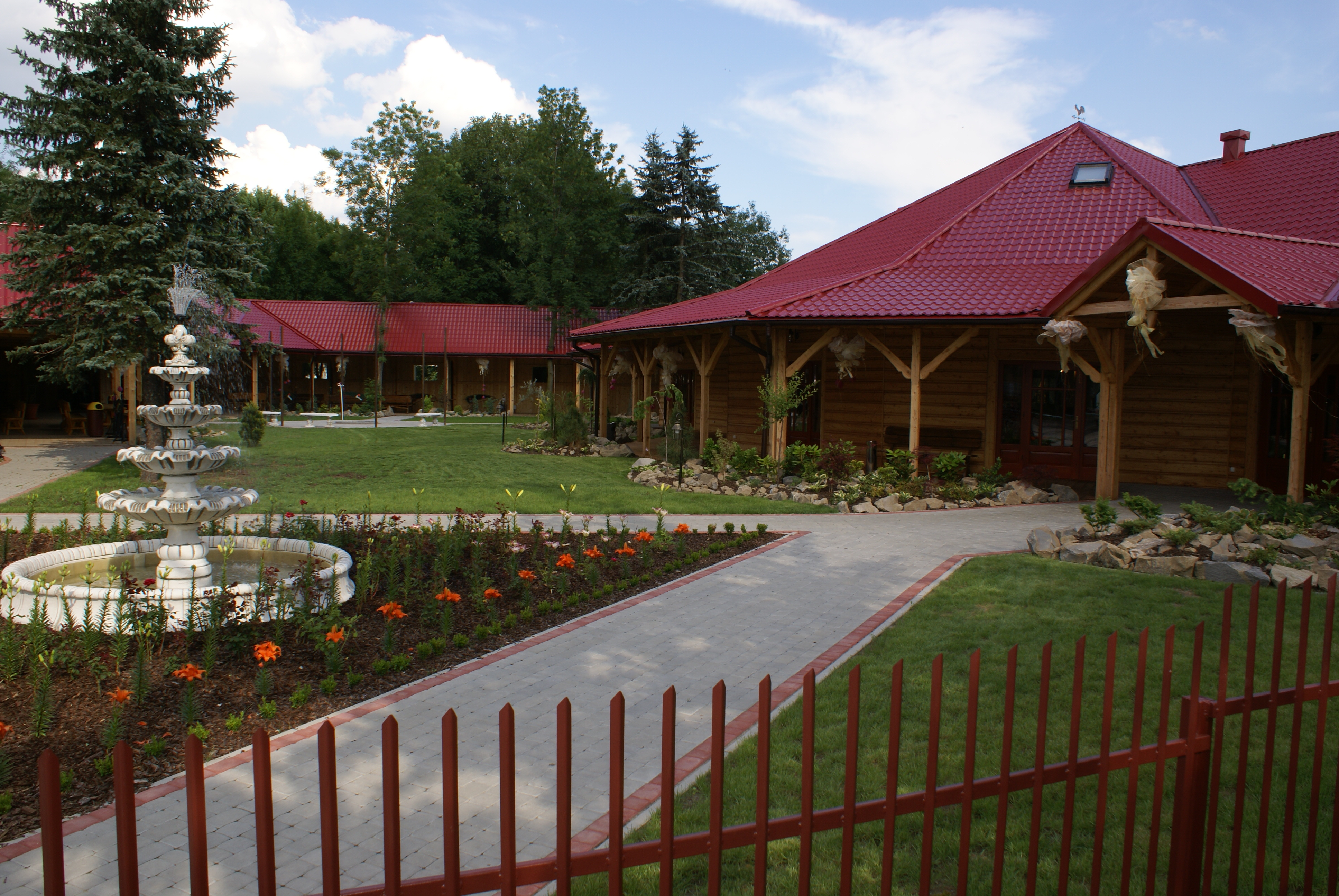 Dwór Modrzewiowy w Tarnowie-Mościcach